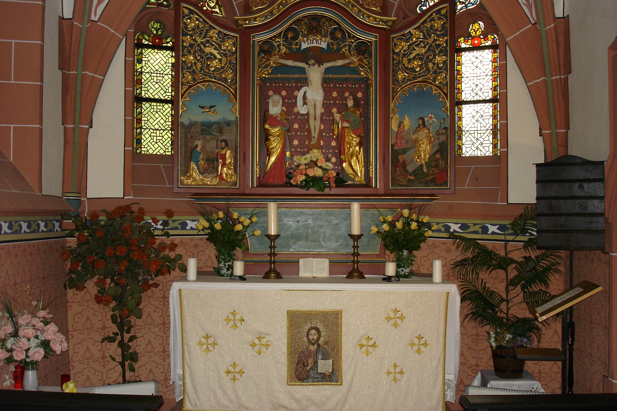 Altar der Kransberger Schlosskapelle